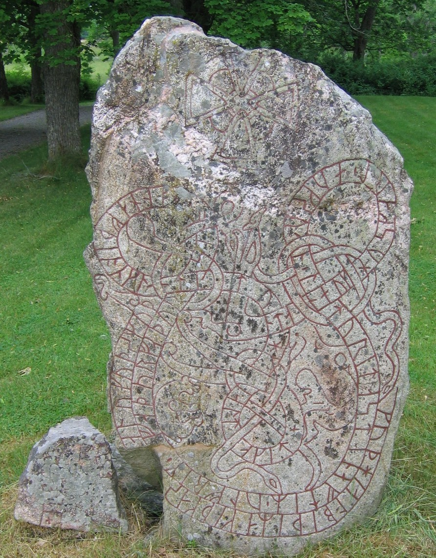 Runestone U 241 at Lingsberg, Uppland, Sweden.